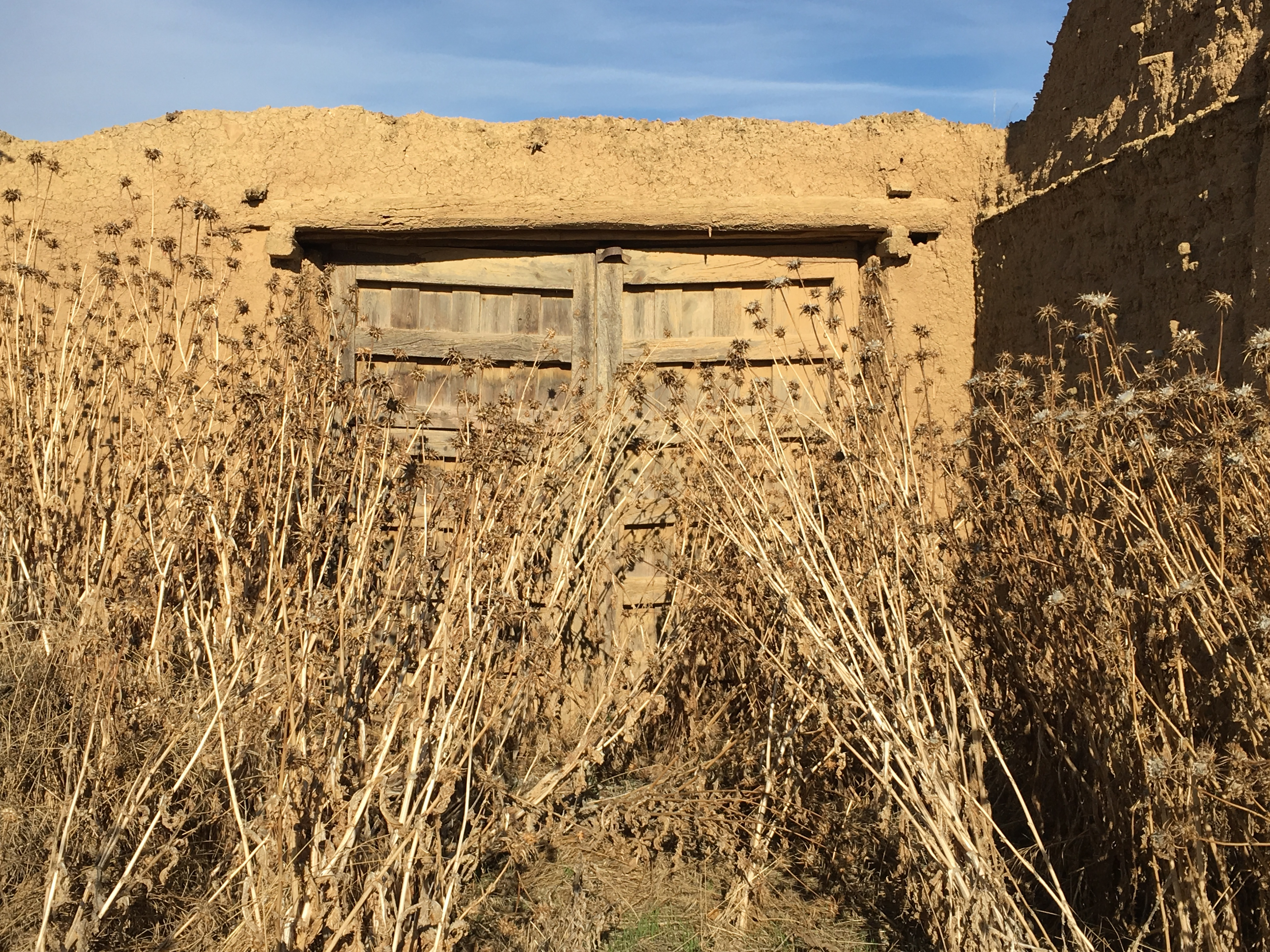 Villaesper Milenario